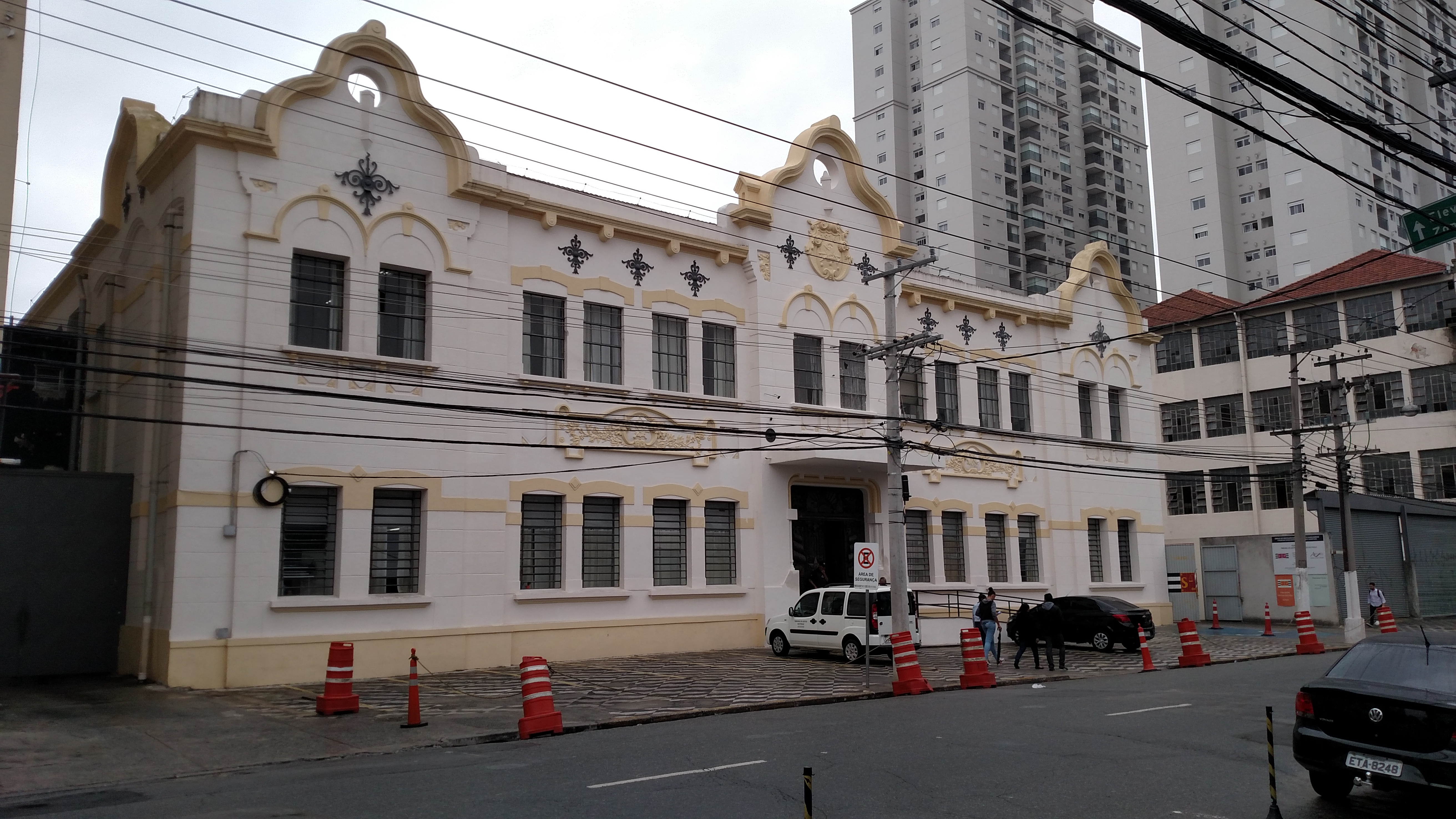 Foto lateral da Primeira Escola Profissional Masculina, construída em 1917 no bairro do Brás em São Paulo (SP), Brasil.